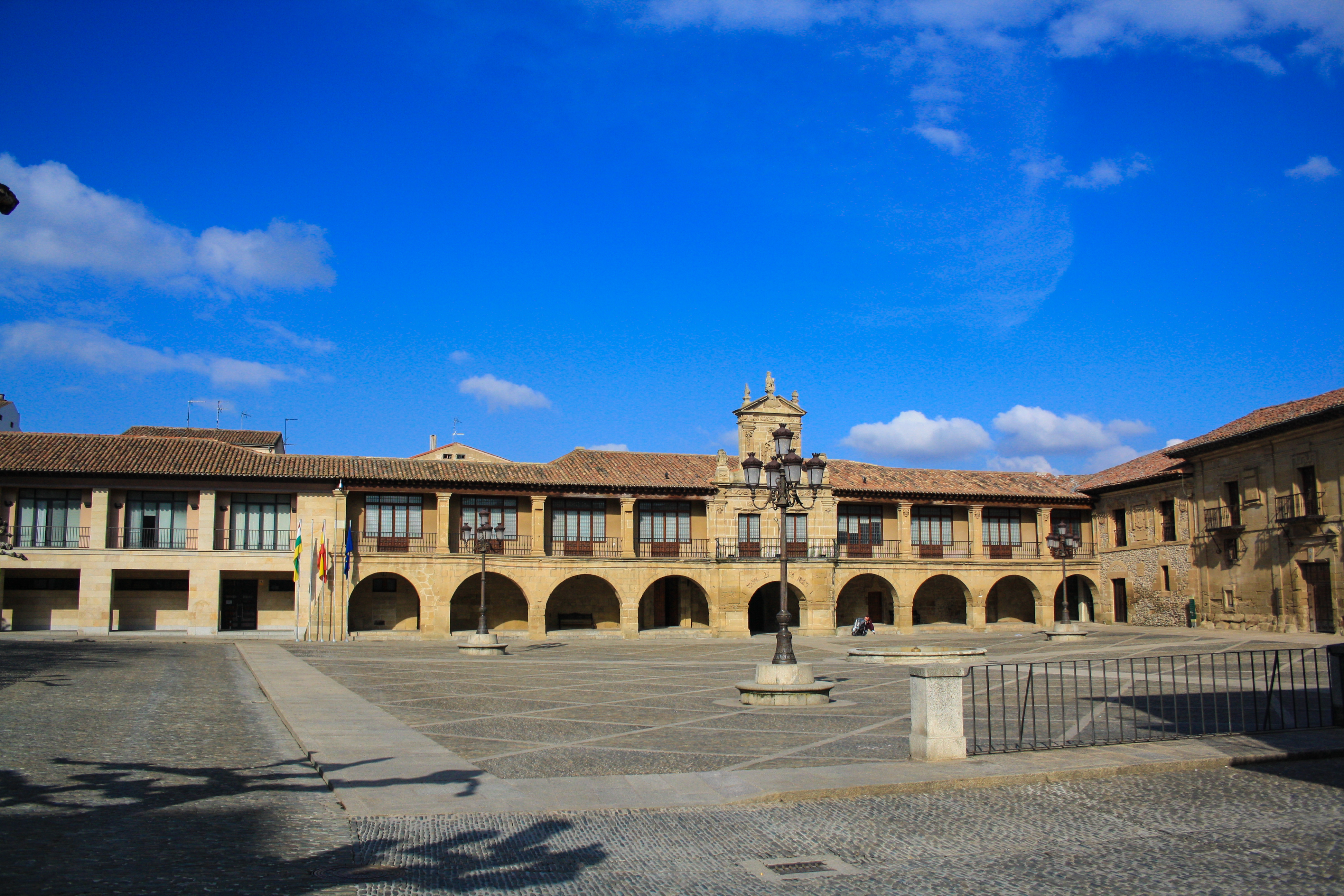 Santo Domingo de la Calzada